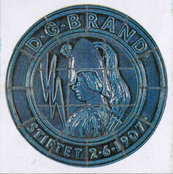 Logo tegnet af Lars Värild (1910-1945) ca. 1941, selskabet ændre senere logo i 1979.